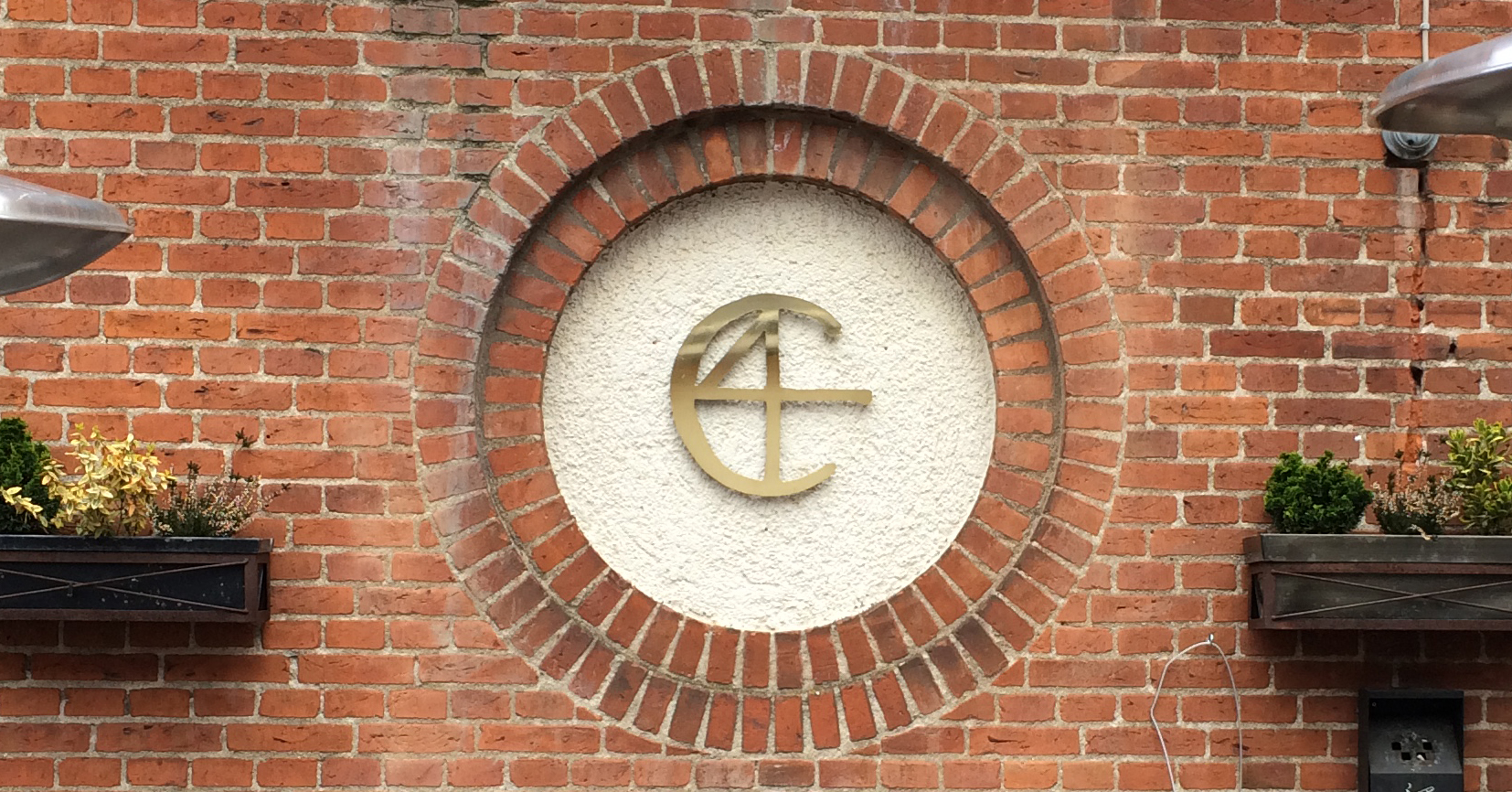 Skilt ved værtshuset Christian Firtal i Vintapperstræde, Odense. Maj 2015.